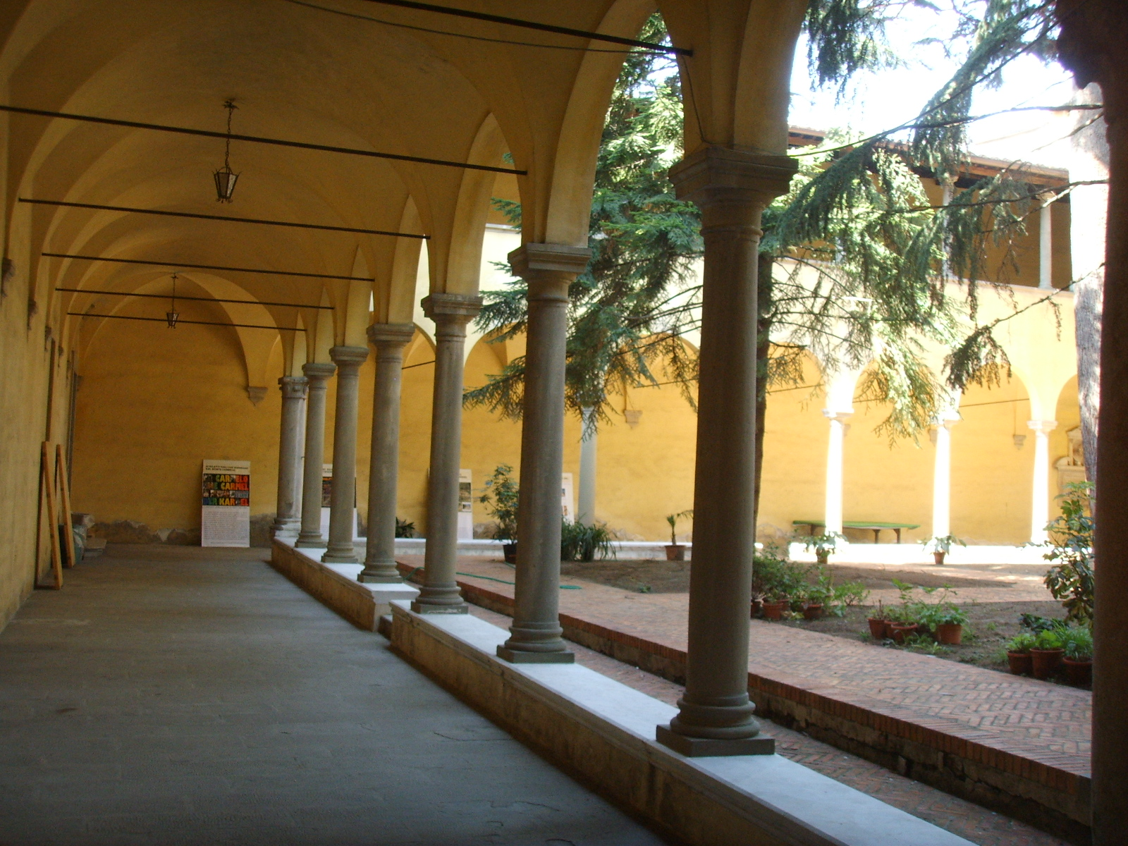 Chiesa del carmine, pisa, chiostro